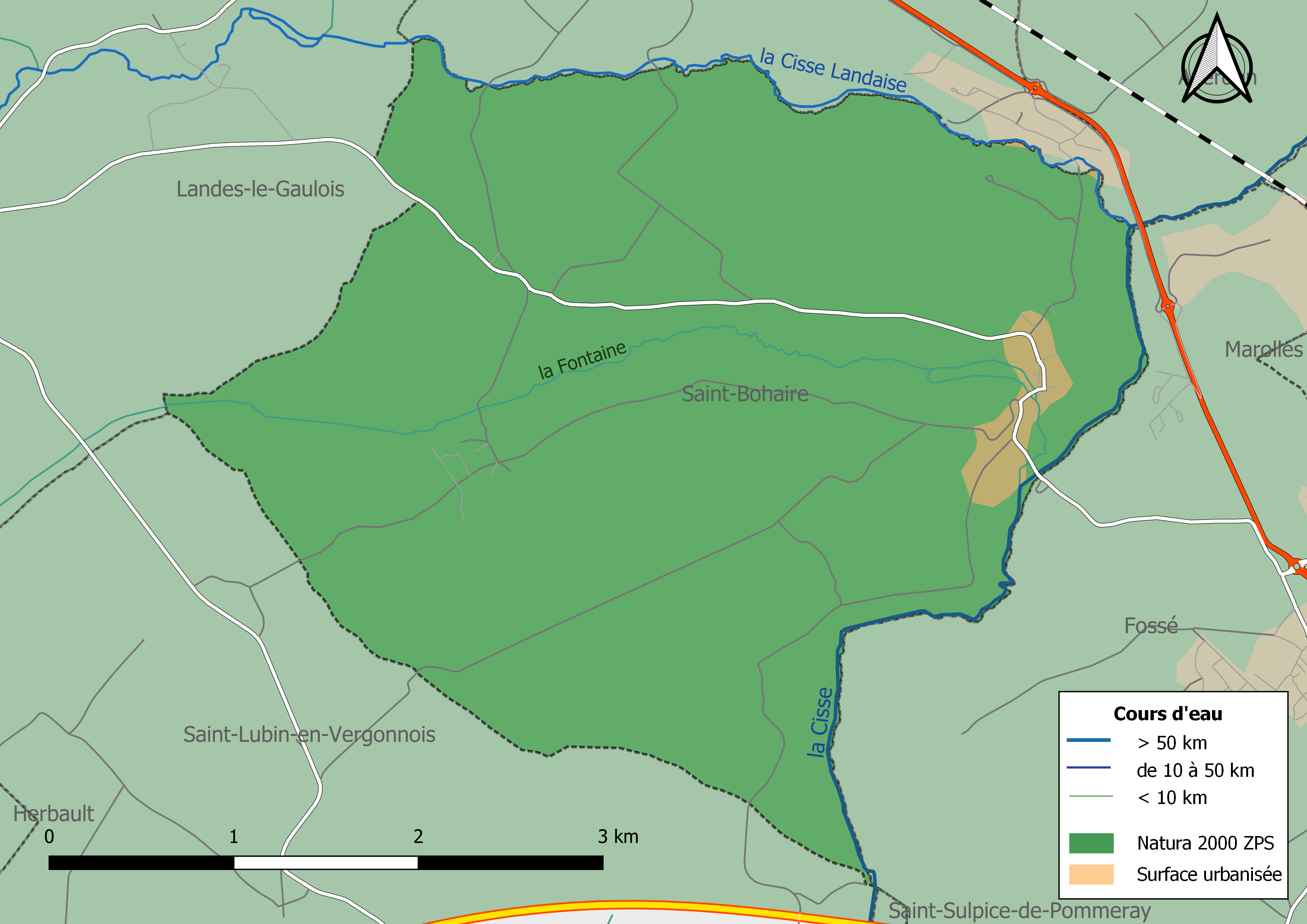 Carte du site Natura 2000 de type ZPS de la commune de Saint-Bohaire (France).